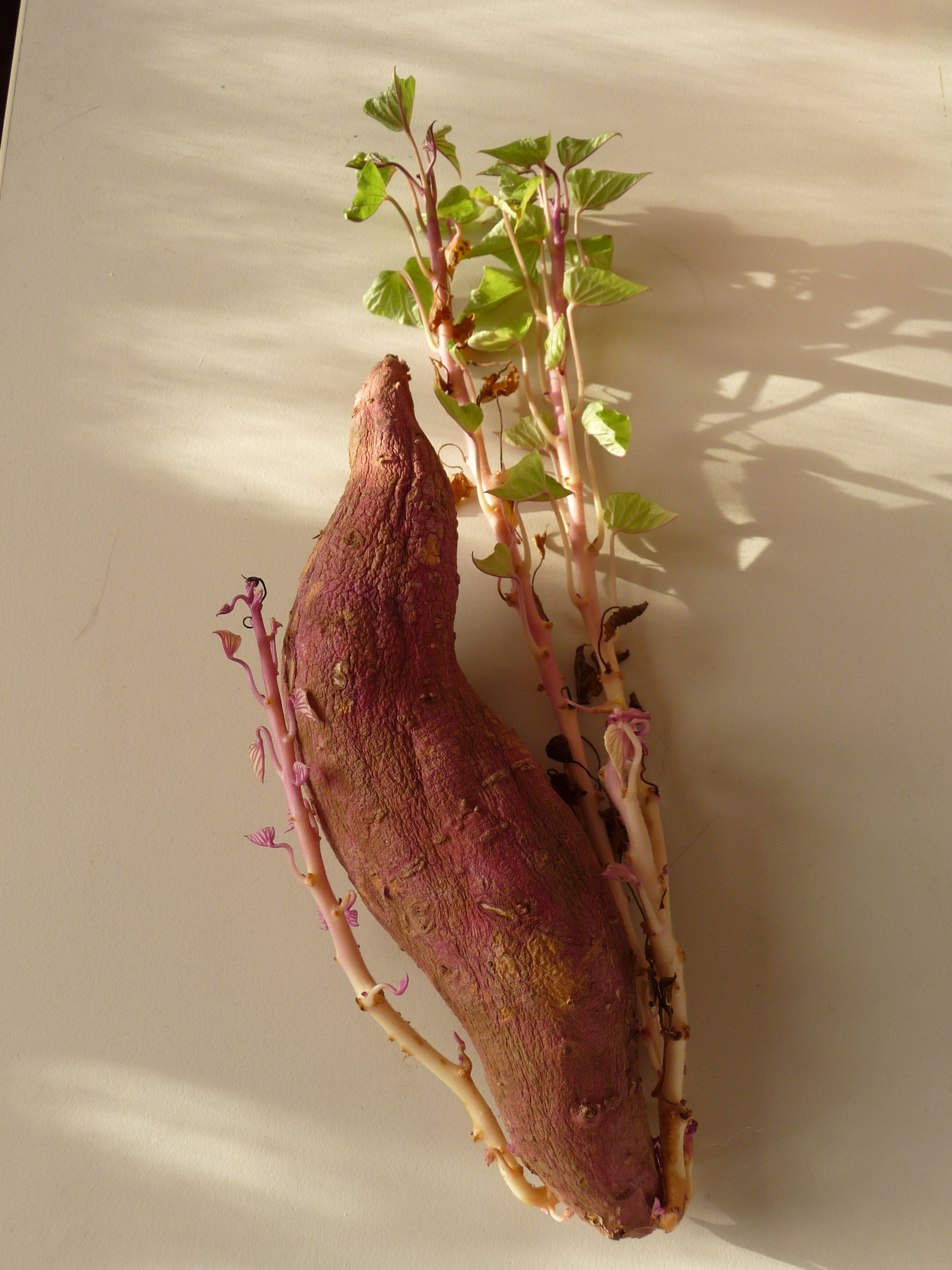 Patate douce germée